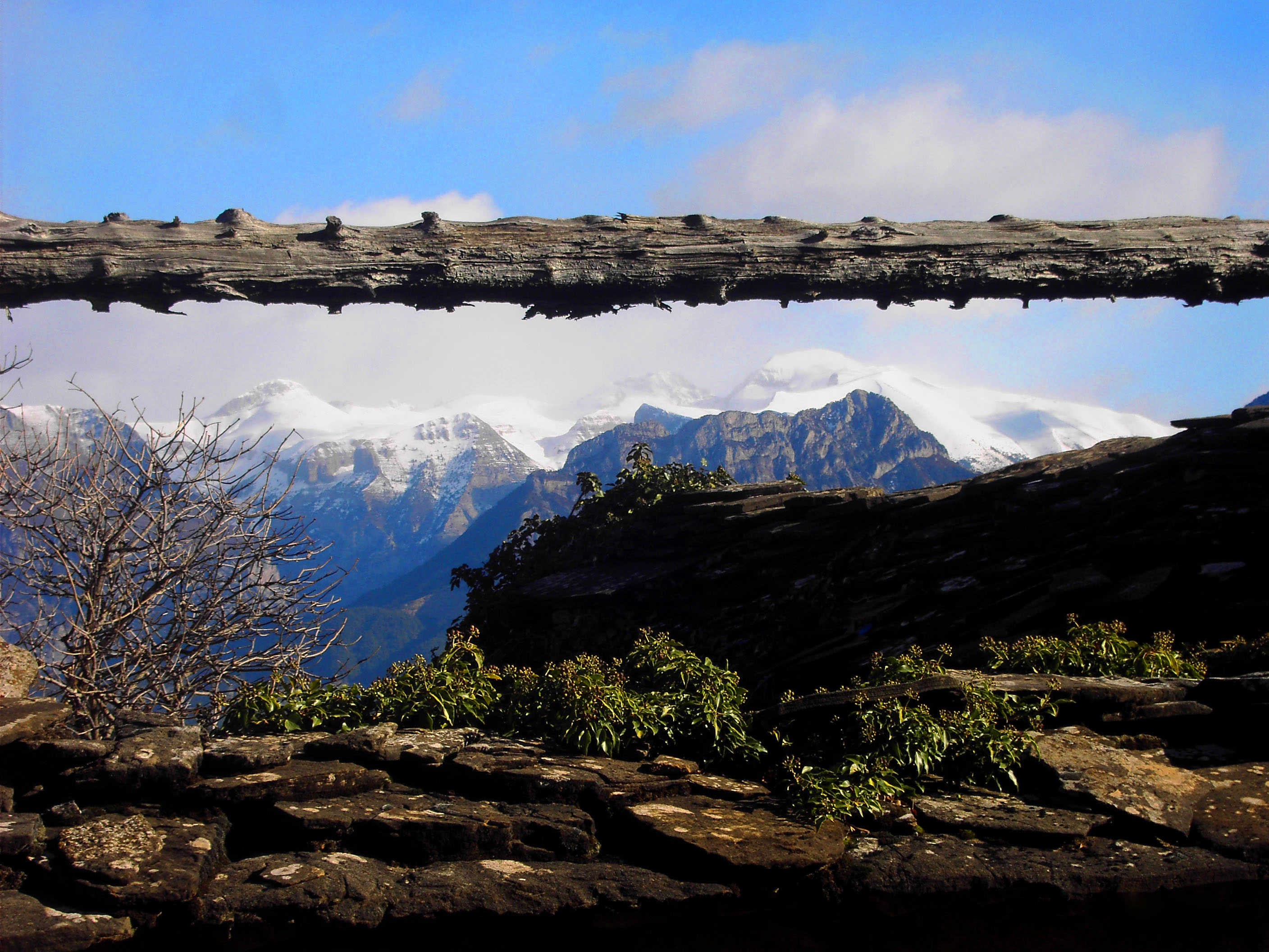 Aragonés: Detalle d'o macizo de Cotiella d'un lenato caito en a valle de Vió, a on que no i queda de piet sique o fuste central.